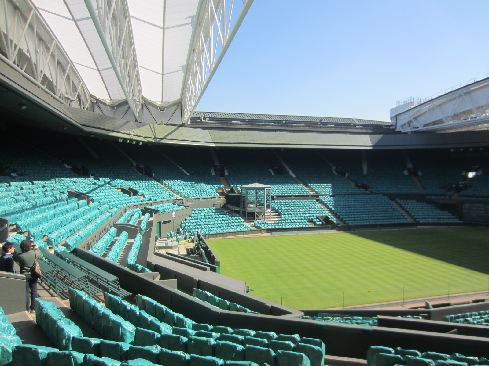 Wimbledon - Centre Court